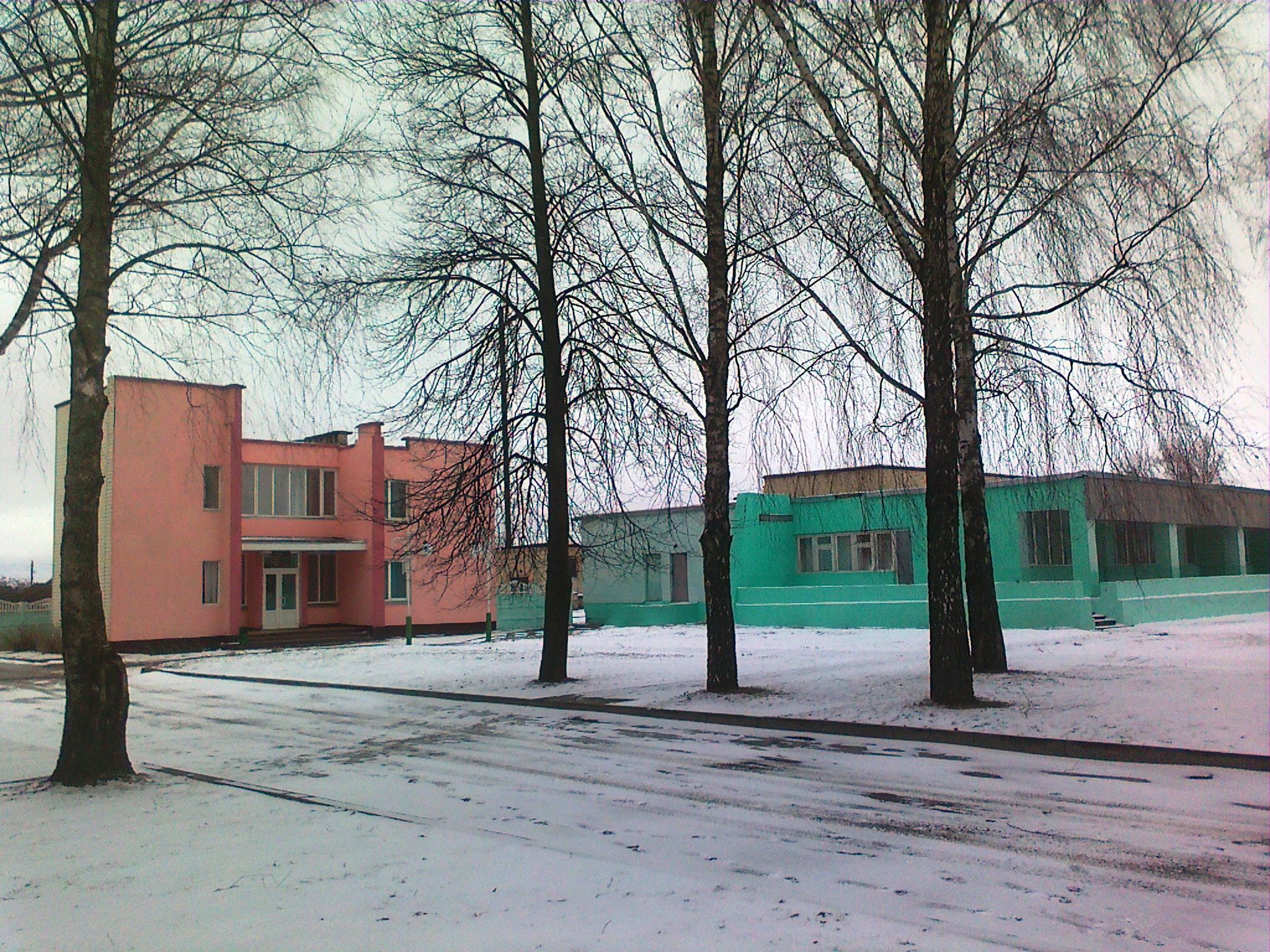 агрогородок Ковали, ул. Центральная